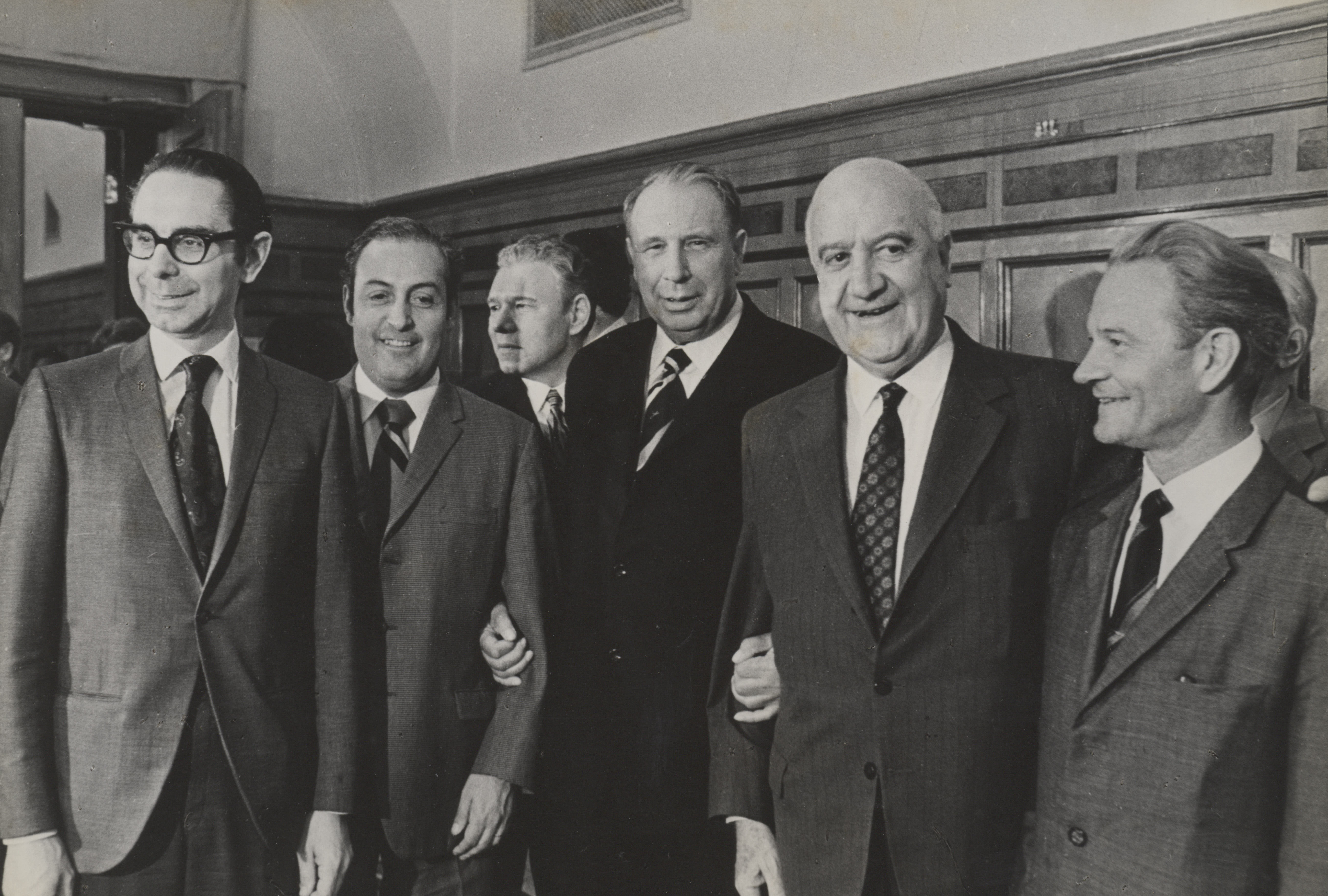 Carlos Altamirano, José Cademártori y Guillermo Del Pedregal